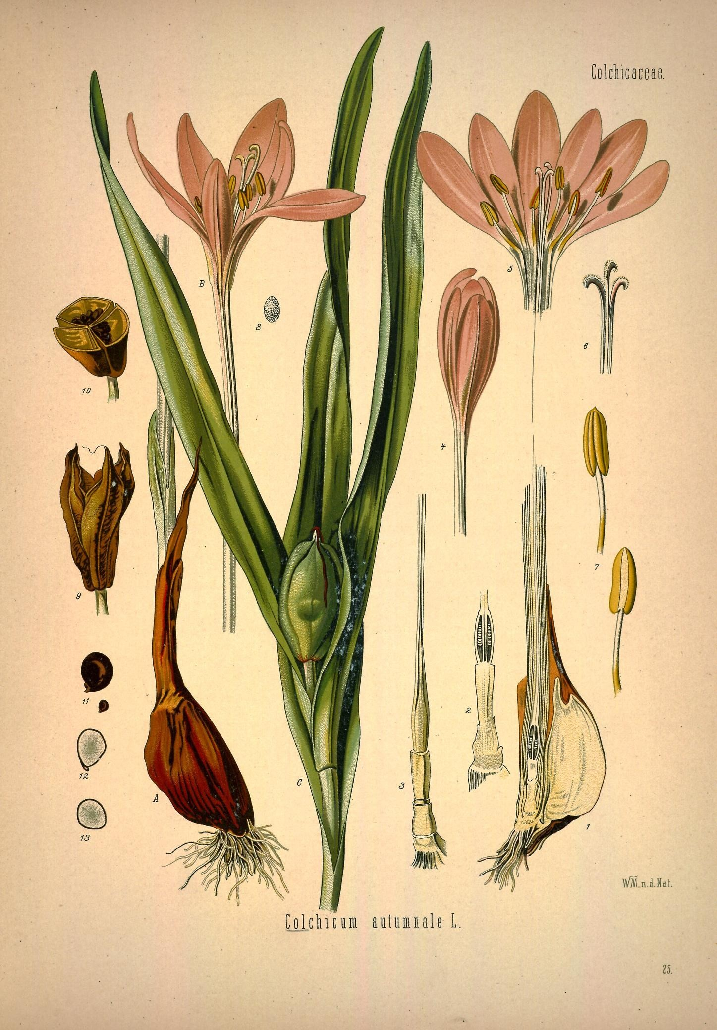 Herbstzeitlose. A B blühende, C fruchtende Pflanze in natürl. Grösse; 1 Knolle im Längsschnitt, desgl.; 2 der zur neuen Knolle anschwellende Theil, oben mit Fruchtknoten, desgl.; 3 u. 4 Blüthenknospe, desgl.; 5 ausgebreitete Blüthe, desgl.; 6 oberer Theil des Griffels, vergrössert; 7 Staubgefässe desgl.; 8 Pollen, desgl.; 9 reife, aufgesprungene Kapsel, natürl. Grösse; 10 Kapsel im Querschnitt, desgl.; 11 Same, natürl. Grösse und vergrössert; 12, 13 derselbe ohne Schale, vergrössert.